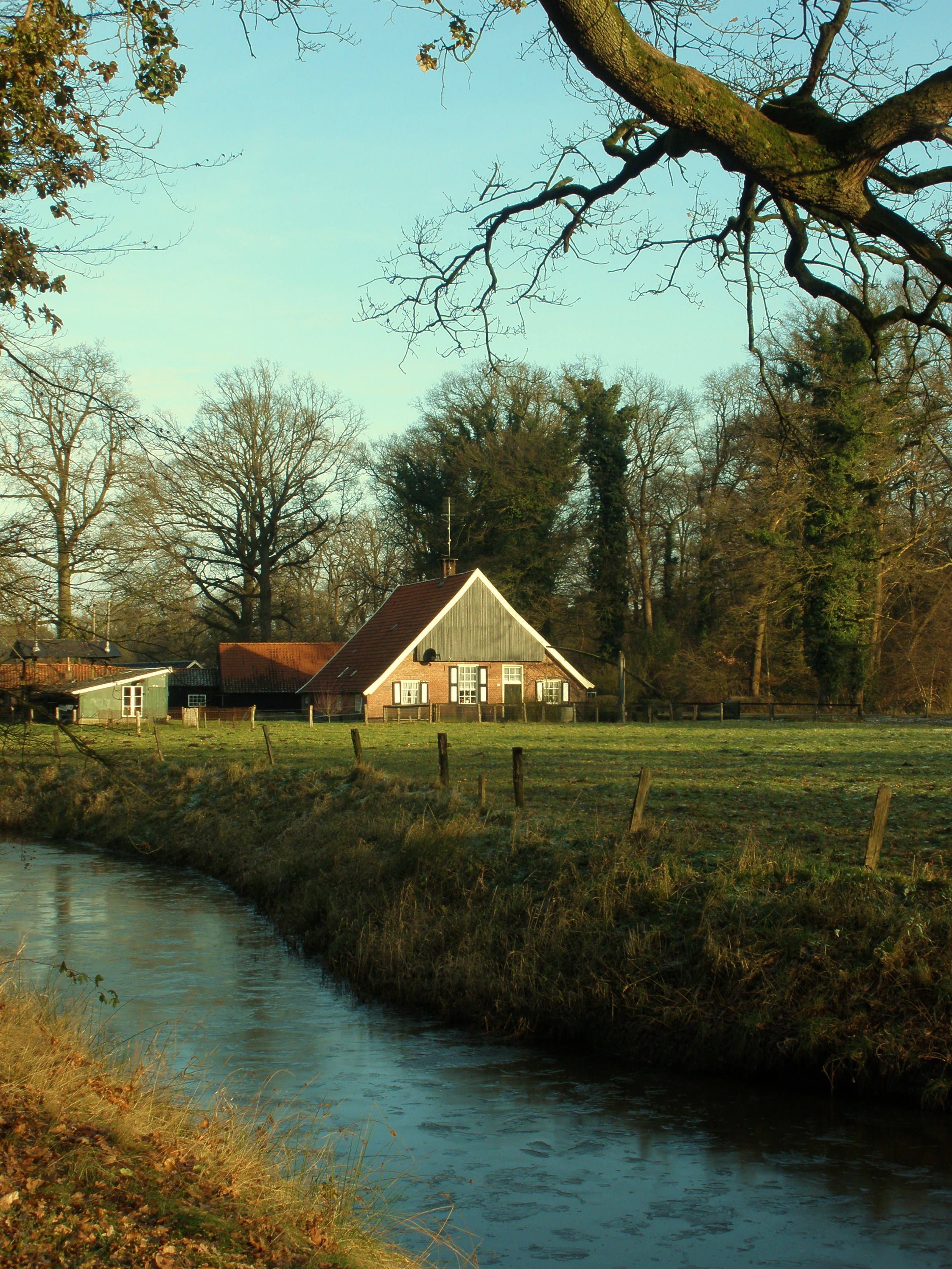 De boerderij Olieslager in Deldeneresch